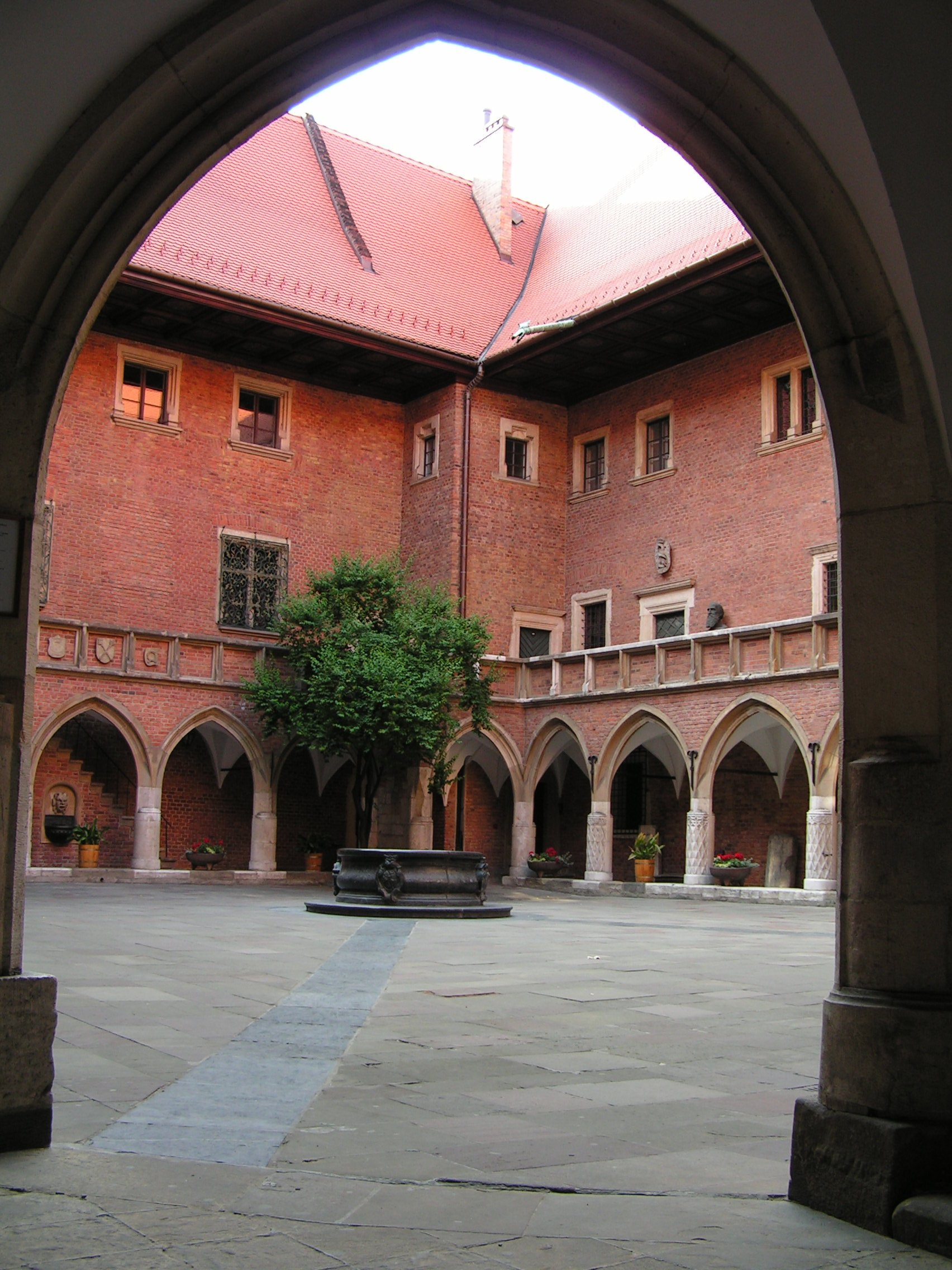 Collegium Maius, Kraków